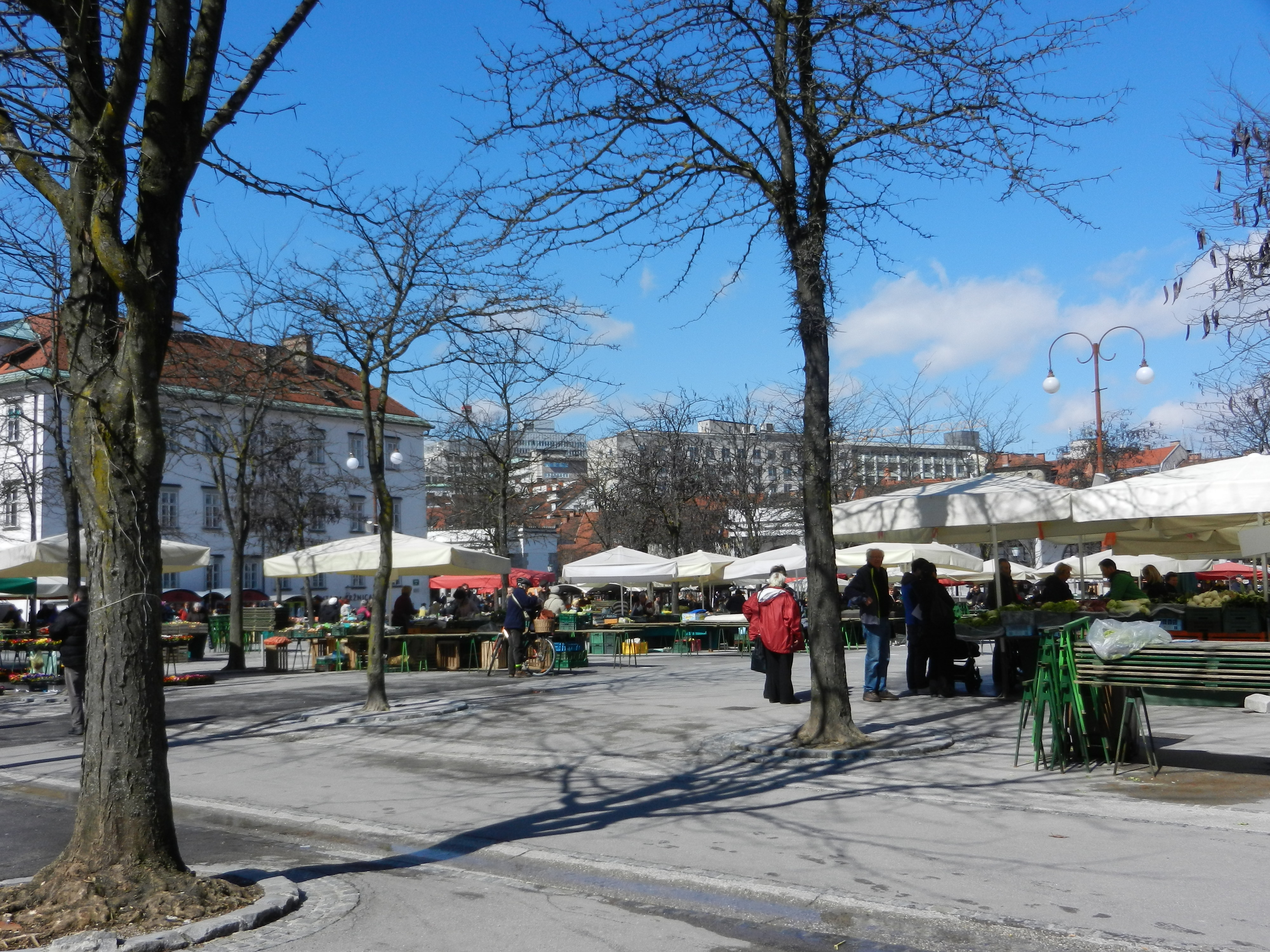 Osrednja Ljubljanska tržnica